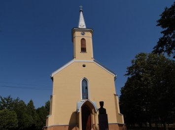 Rumantsch: Biserica catolica din cartierul Gai-municipiul Arad